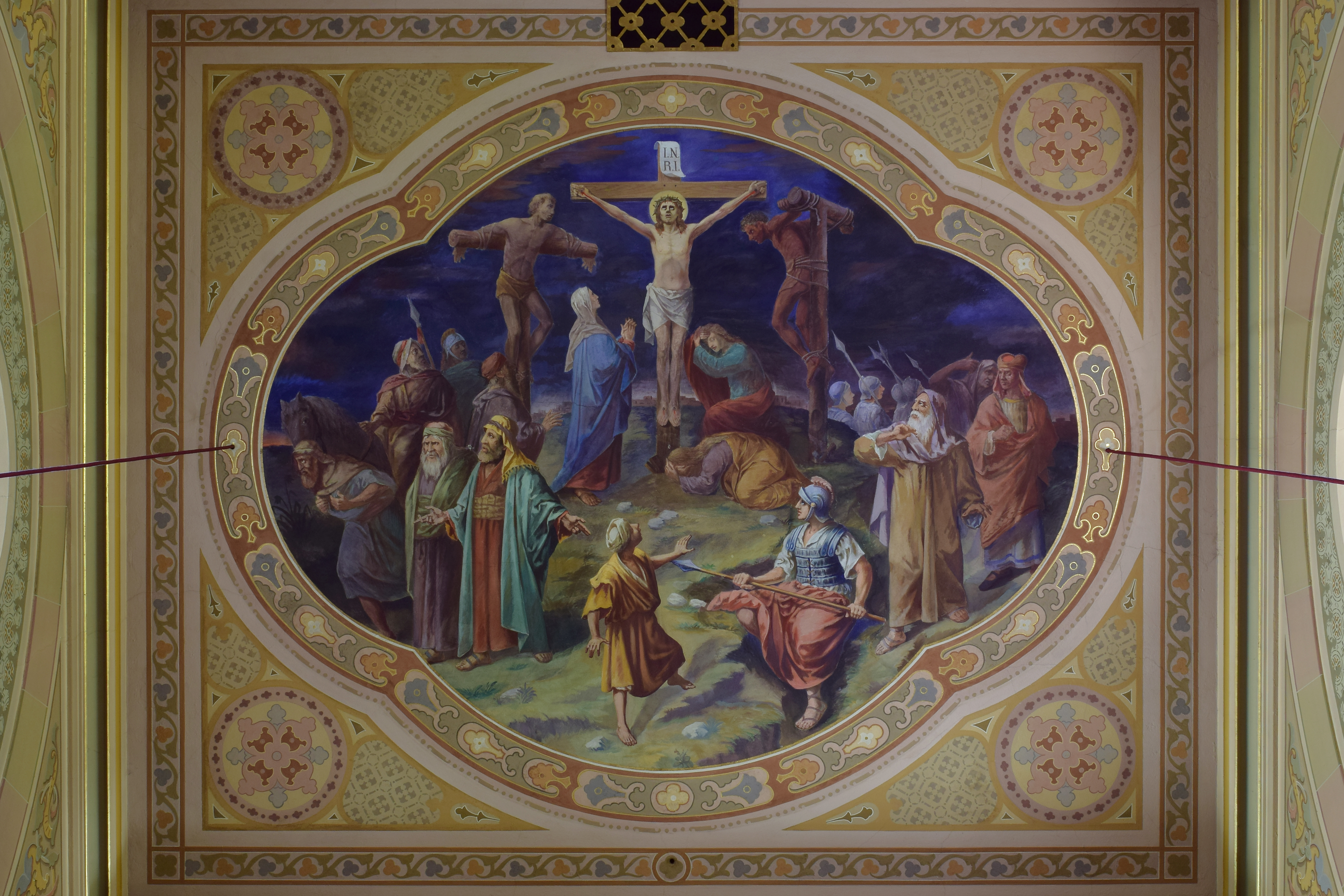 Kath. Pfarrkirche St. Martin in Innervillgraten - Deckenbild "Kreuzigung"